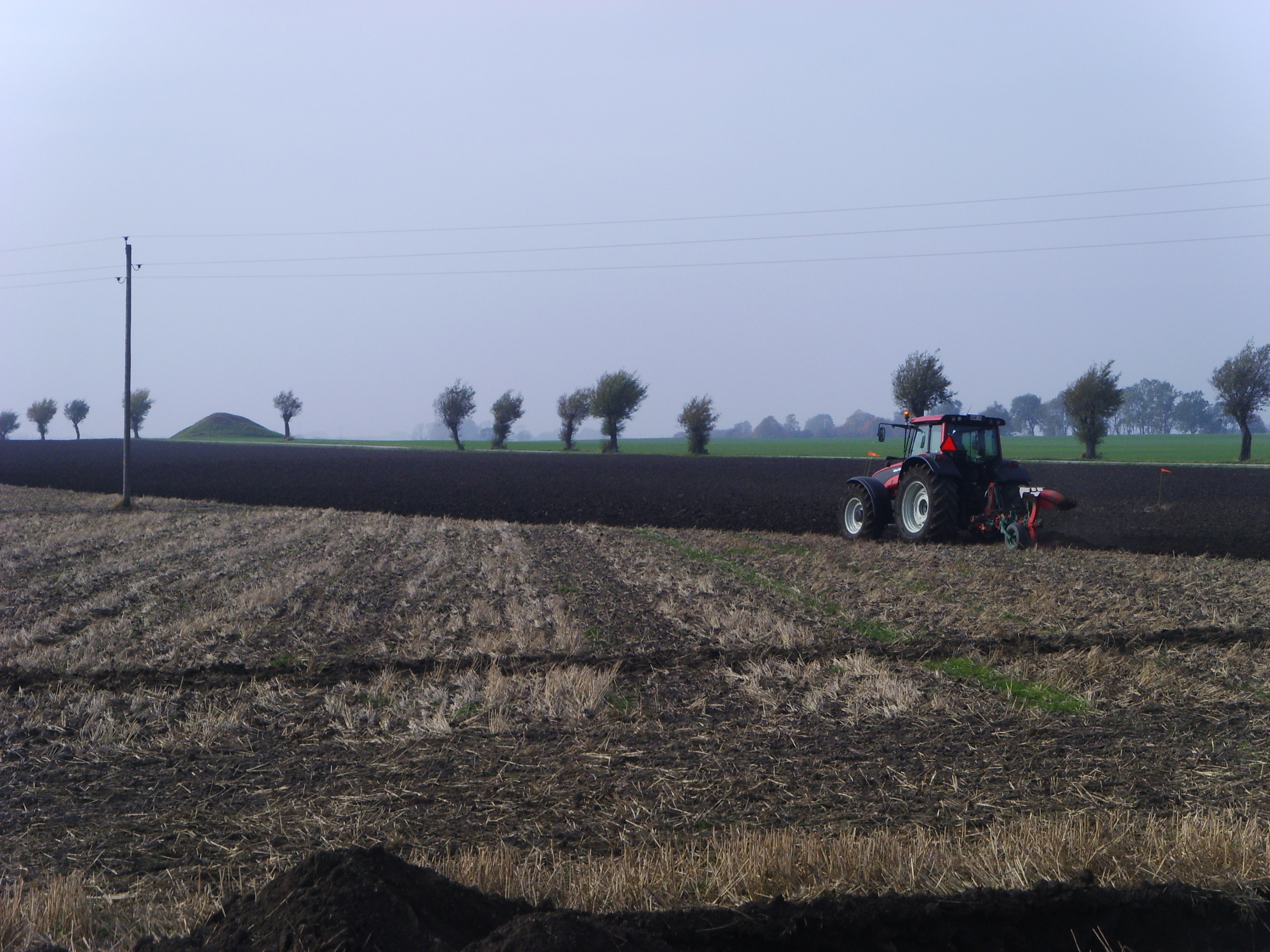 Skånsk fullåkersbygd, full med historia.